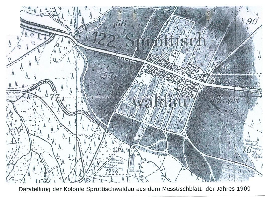 Sprottischwaldau, Meßtischblatt 1900